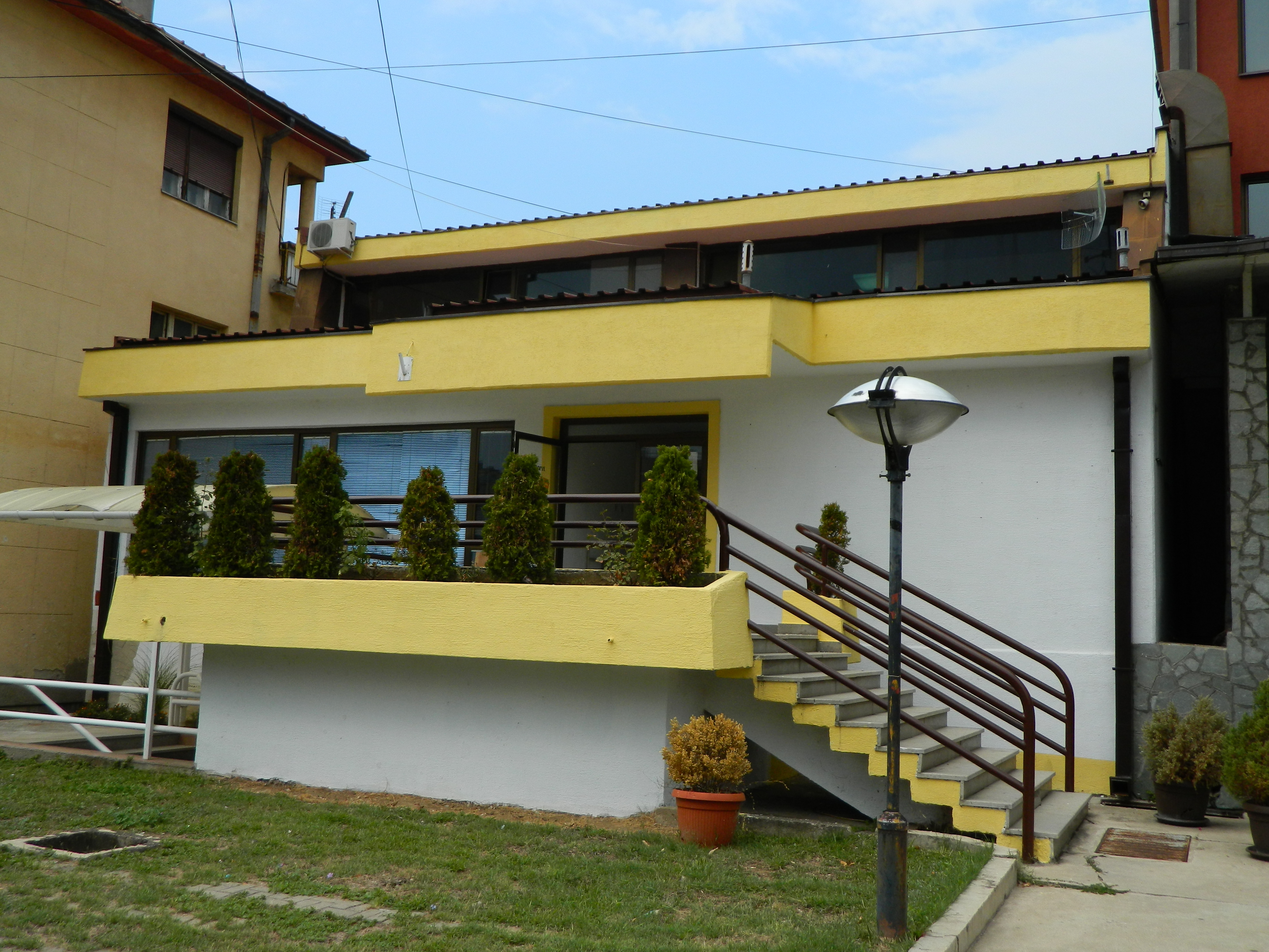 Nova zgrada - Biblioteka "Radoje Domanović", Surdulica